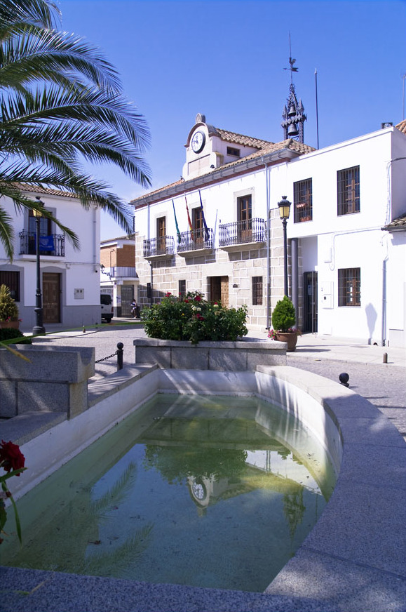 Ayuntamiento de Añora